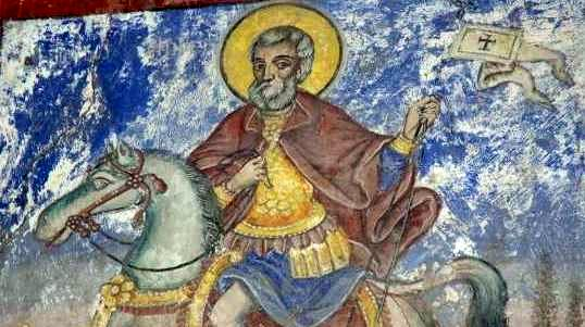 Свети Димитър от църквата „Свети Димитър“ в Тушин, Егейска Македония, Гърция.